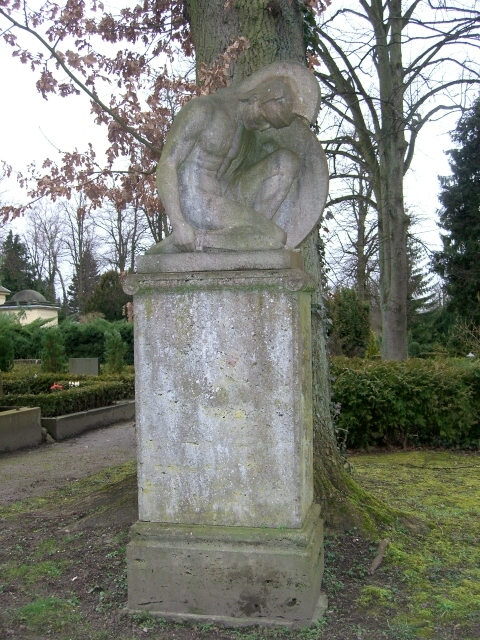 Kriegergrab auf dem Friedhof Wismar (Bildhauer Roland Engelhard